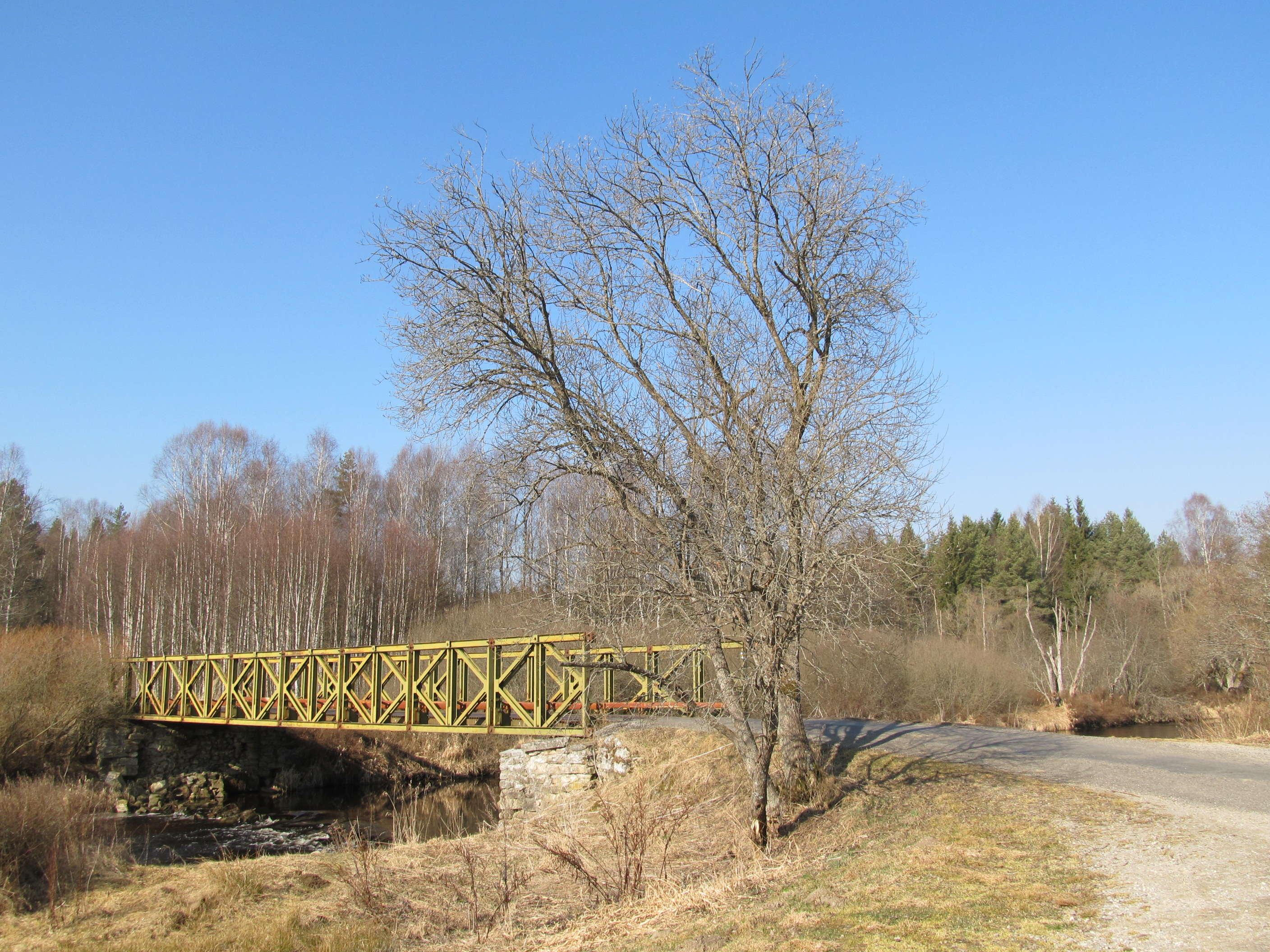 Most přes Vltavu pod Pěknou